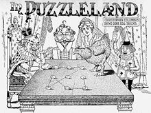 Енциклопедія з Христофором Колумбом